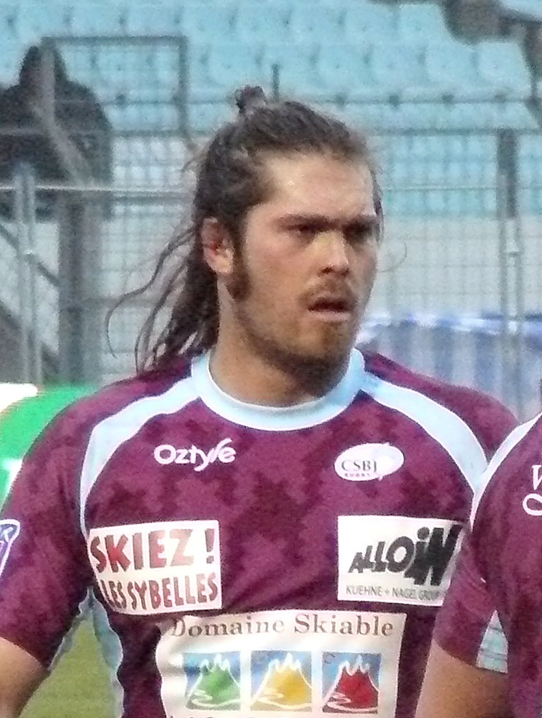 Wessel Jooste, troisième ligne au club CS Bourgoin-Jaillieu lors du match de Top 14 contre le Racing Métro 92, 3 janvier 20010 à Colombes.